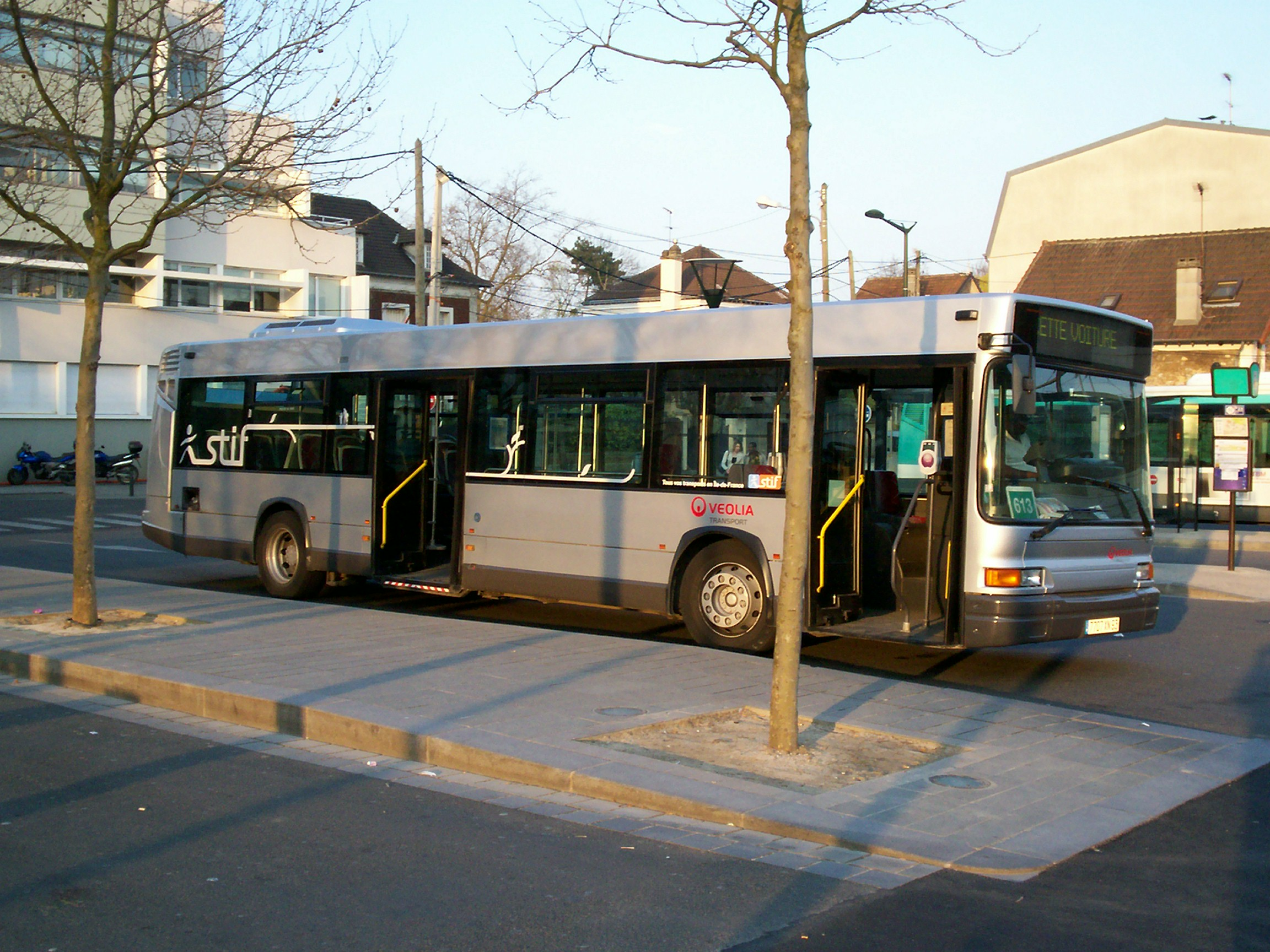 Bus GX317 en livrée Veolia Transport en gare de Chelles